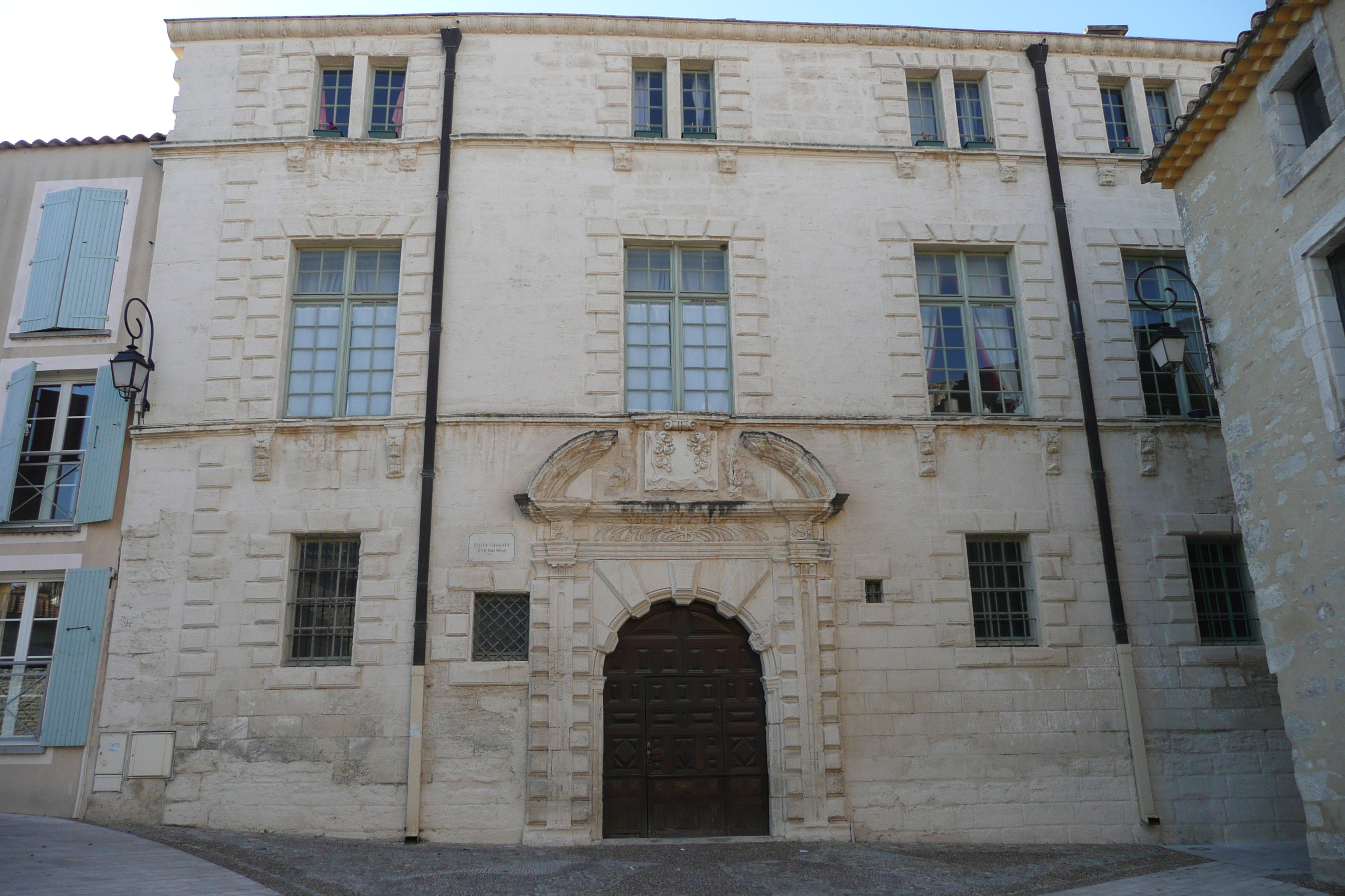 Hôtel du 17 ème siècles en Aramon.